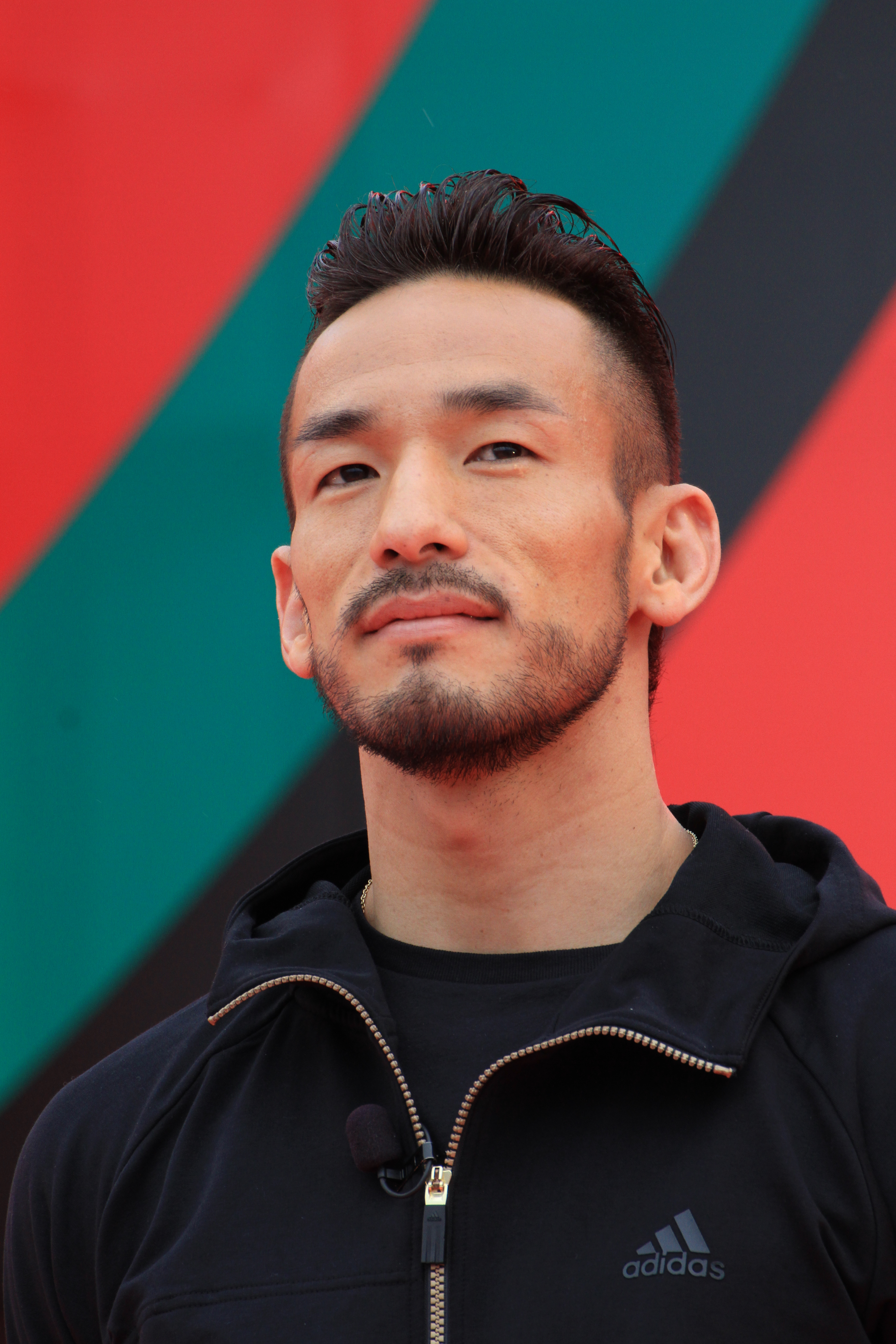 Hidetoshi Nakata in 2012.